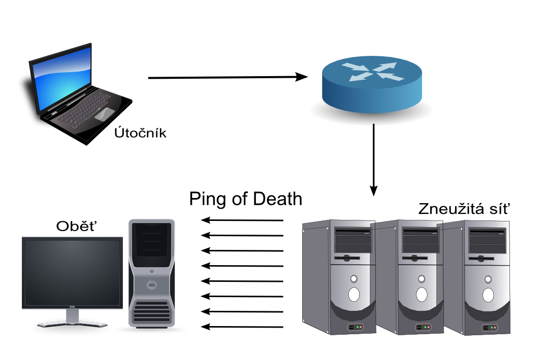 Obrazek, nebo spise schema pro lepsi predstavu, jak muze probihat utok ping of death